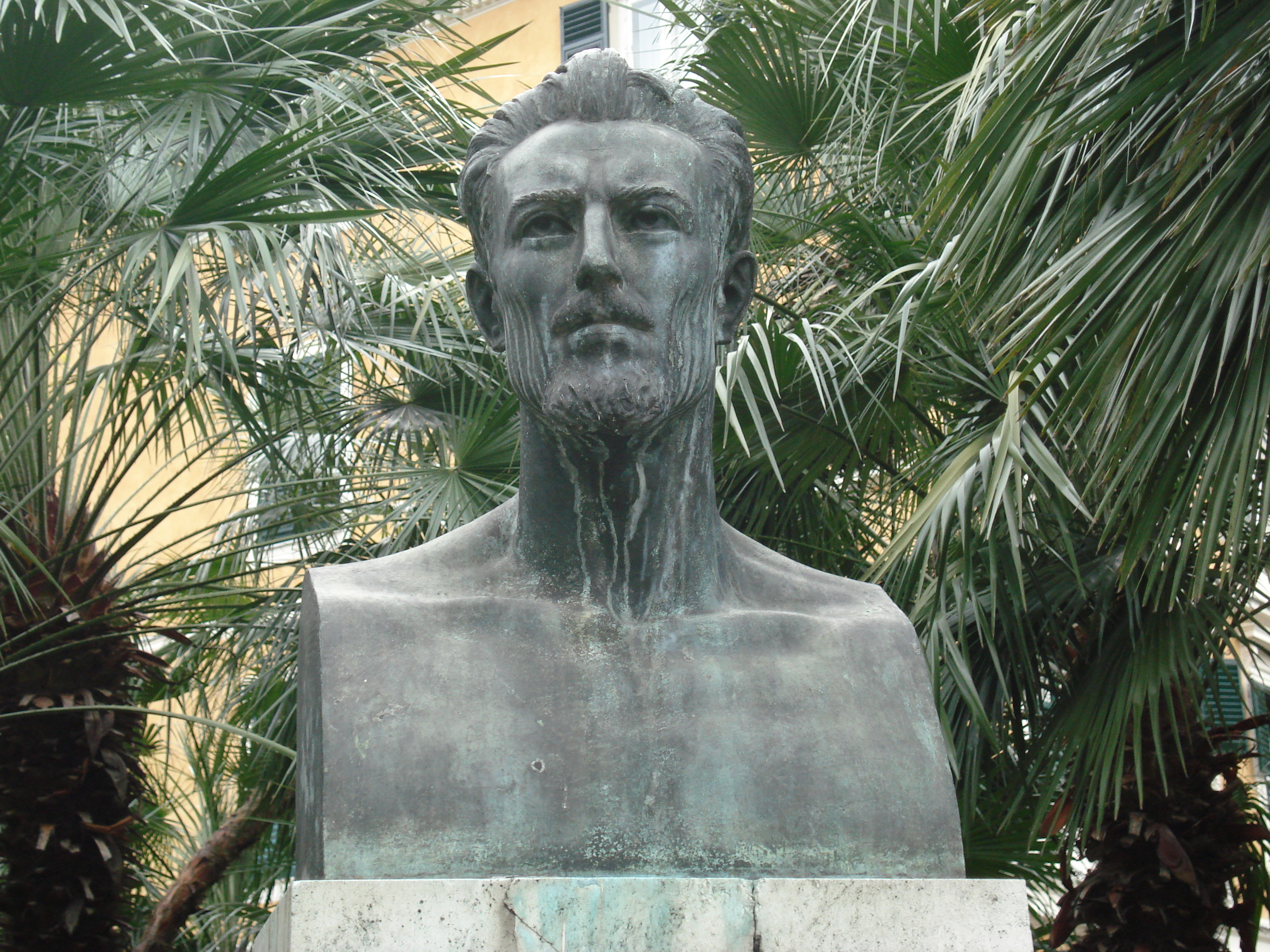 Cosmin latan,30-03-2008,Aldo Gastaldi